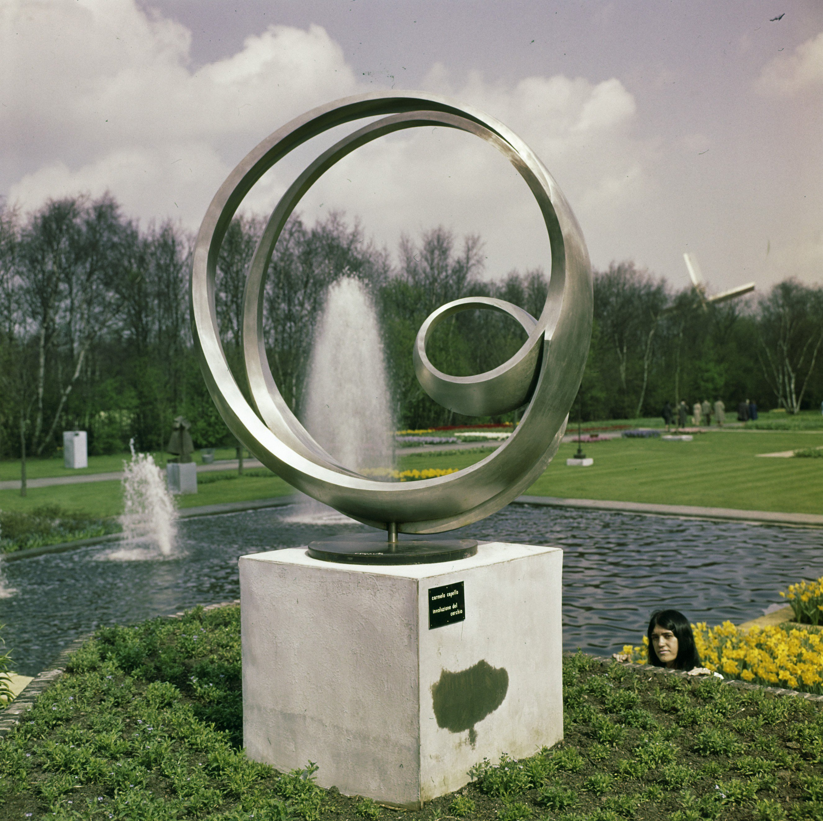 Collectie / Archief : Fotocollectie Anefo Reportage / Serie : [ onbekend ] Beschrijving : Italiaanse inzending van Carmelo Cappello, een in staal uitgevoerd rondfiguur genaamd "Involuzione del Cerchic B" Datum : 20 april 1964 Locatie : Lisse Trefwoorden : beelden Instellingsnaam : Keukenhof Fotograaf : Nijs, Jac. de / Anefo Auteursrechthebbende : Nationaal Archief Materiaalsoort : Dia (kleur) Nummer archiefinventaris : bekijk toegang 2.24.01.07 Bestanddeelnummer : 254-7161